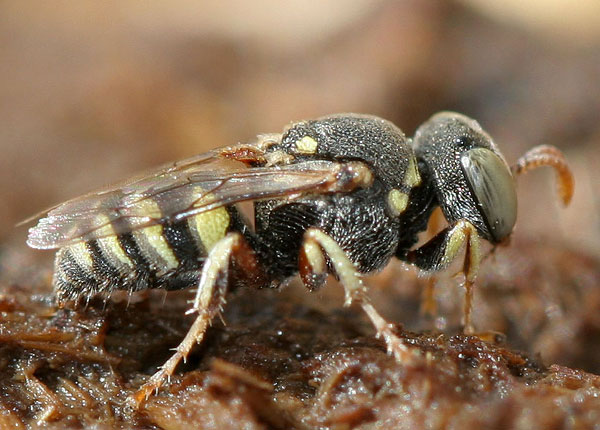 Sou Brasileiro